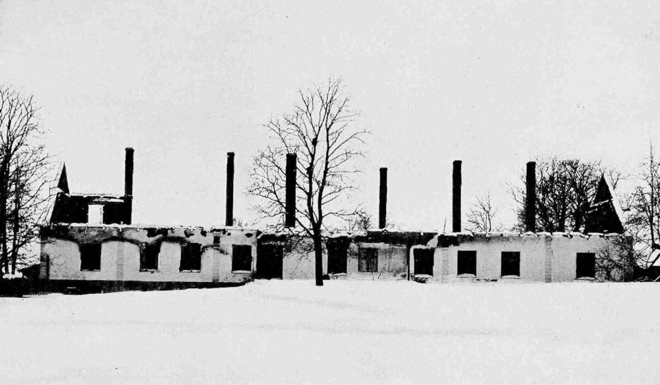 Rāmuļi mõisa peahoone pärast 1905. aasta põlengut.